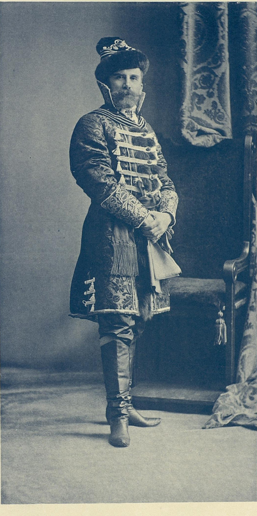 Генерал-майор Барон Константин Карлович (Константин Николай) фон Штакельберг, (в костюме боярина XVII века)